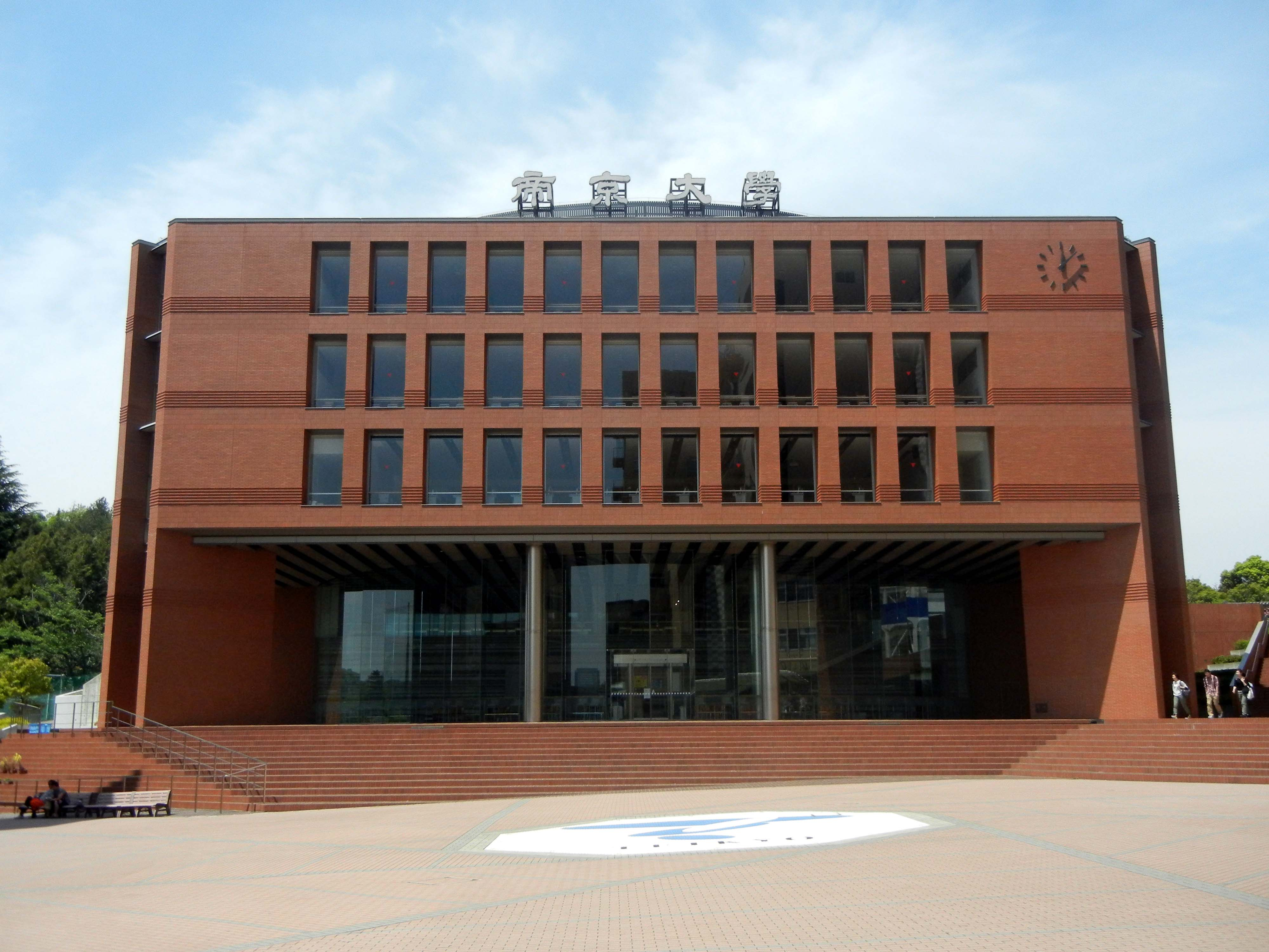 帝京大学メディアライブラリーセンター